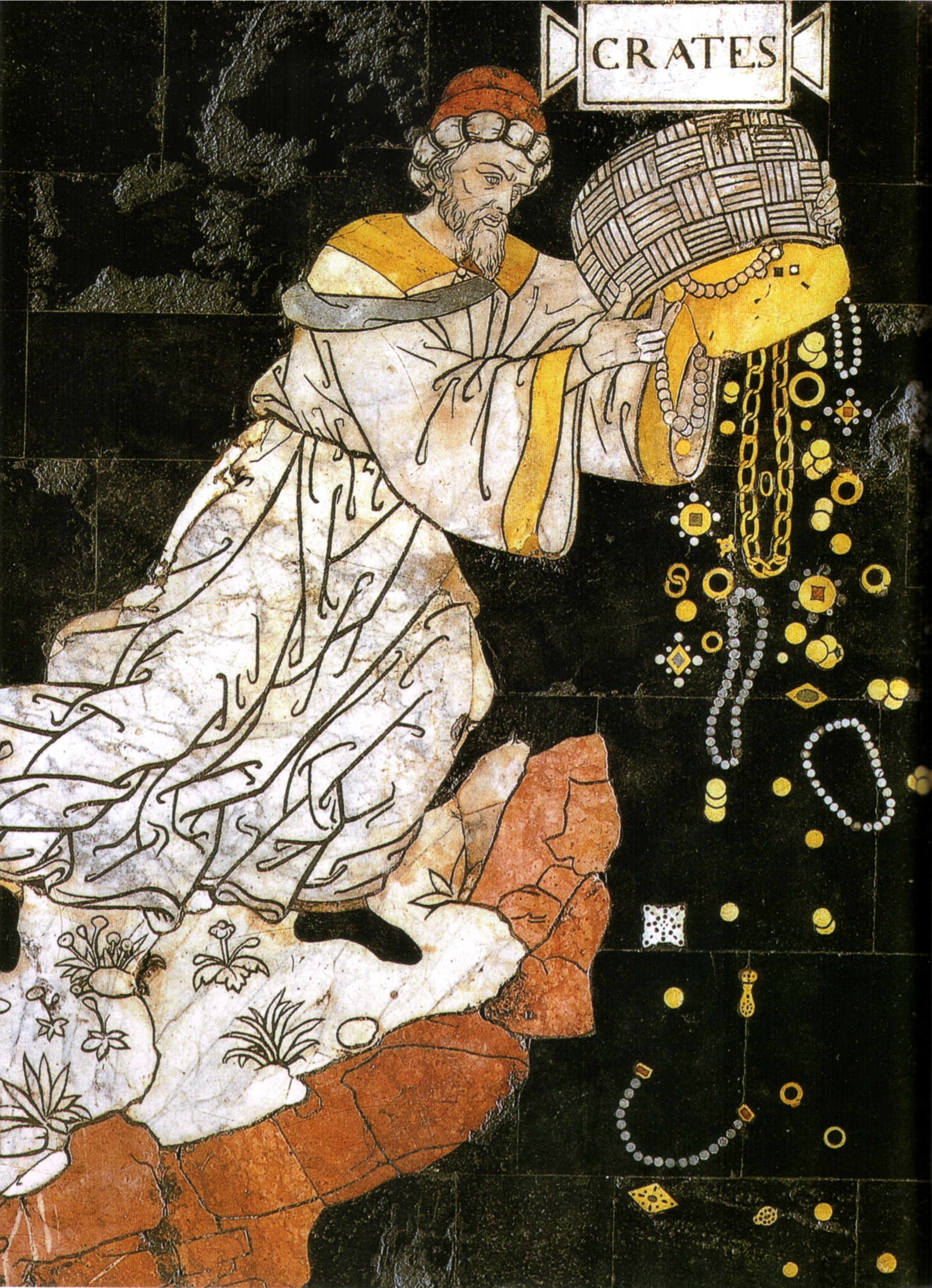 Pavimento di siena, allegoria del colle della sapienza (pinturicchio) 03 cratete